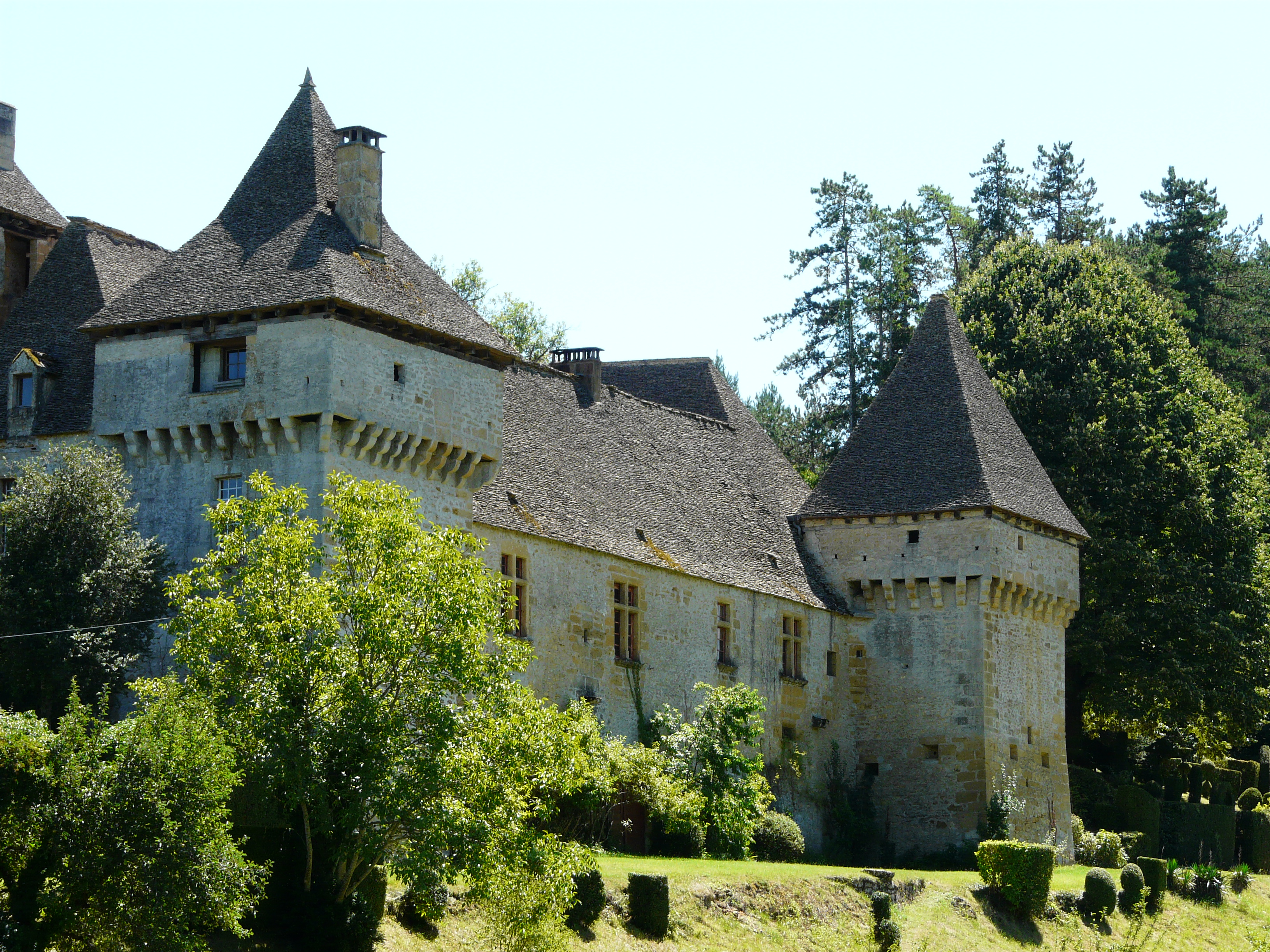 Le château de la Grande Filolie, Saint-Amand-de-Coly, Dordogne, France